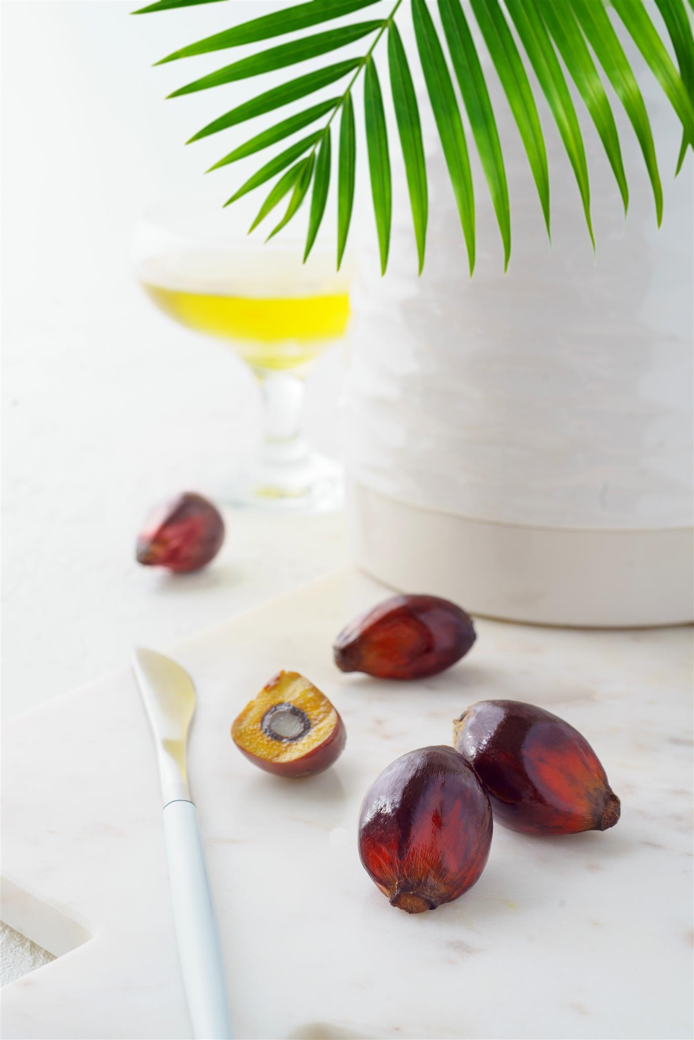 Пальмовое масло - №1 по использованию в пищевой промышленности всего мира